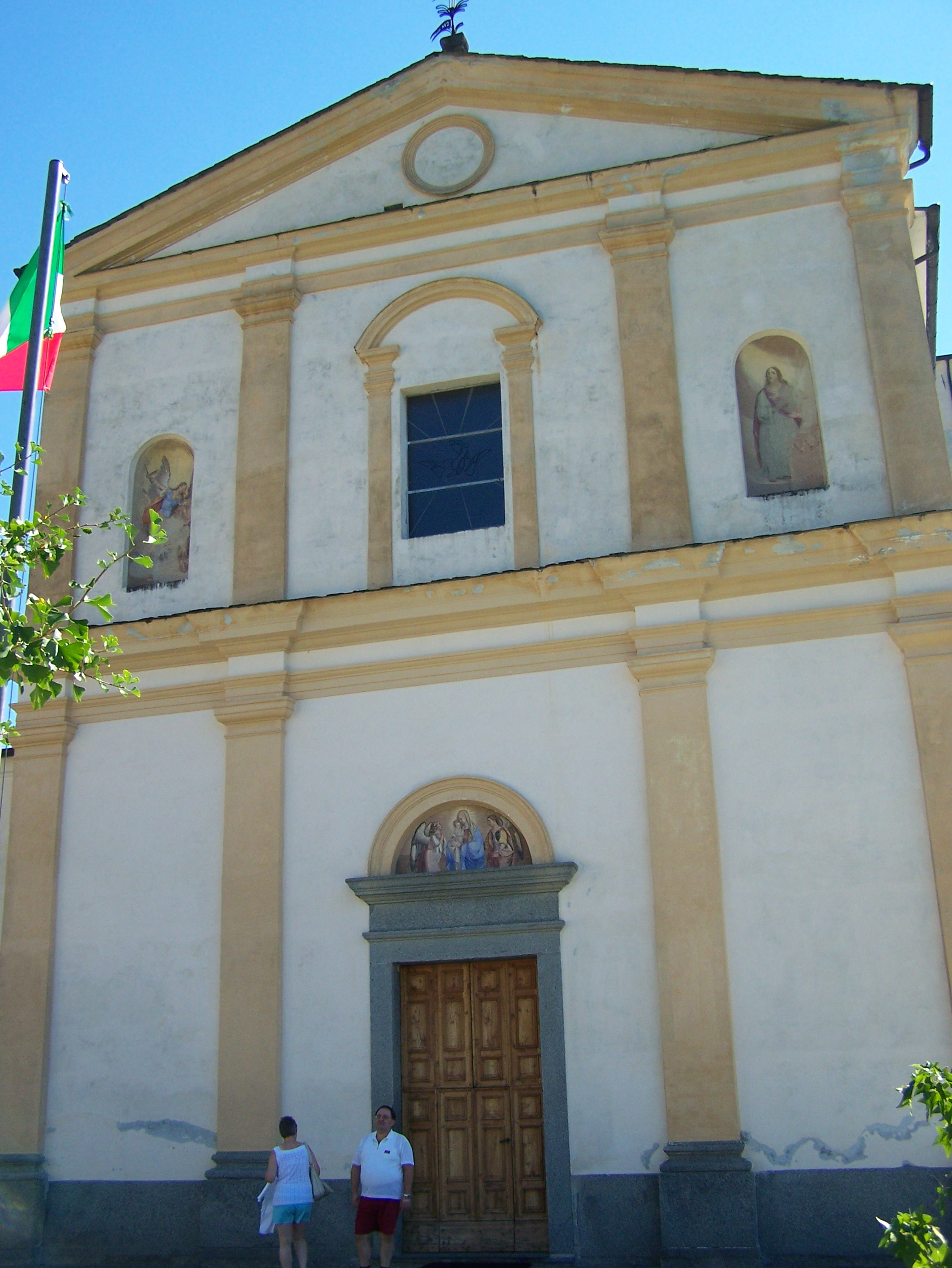 La chiesa parrocchiale di San Michele a Cercino (SO) - Italy